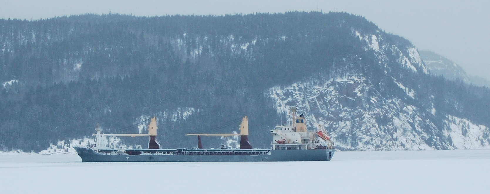 Bateau dans la baie des Ha! Ha!